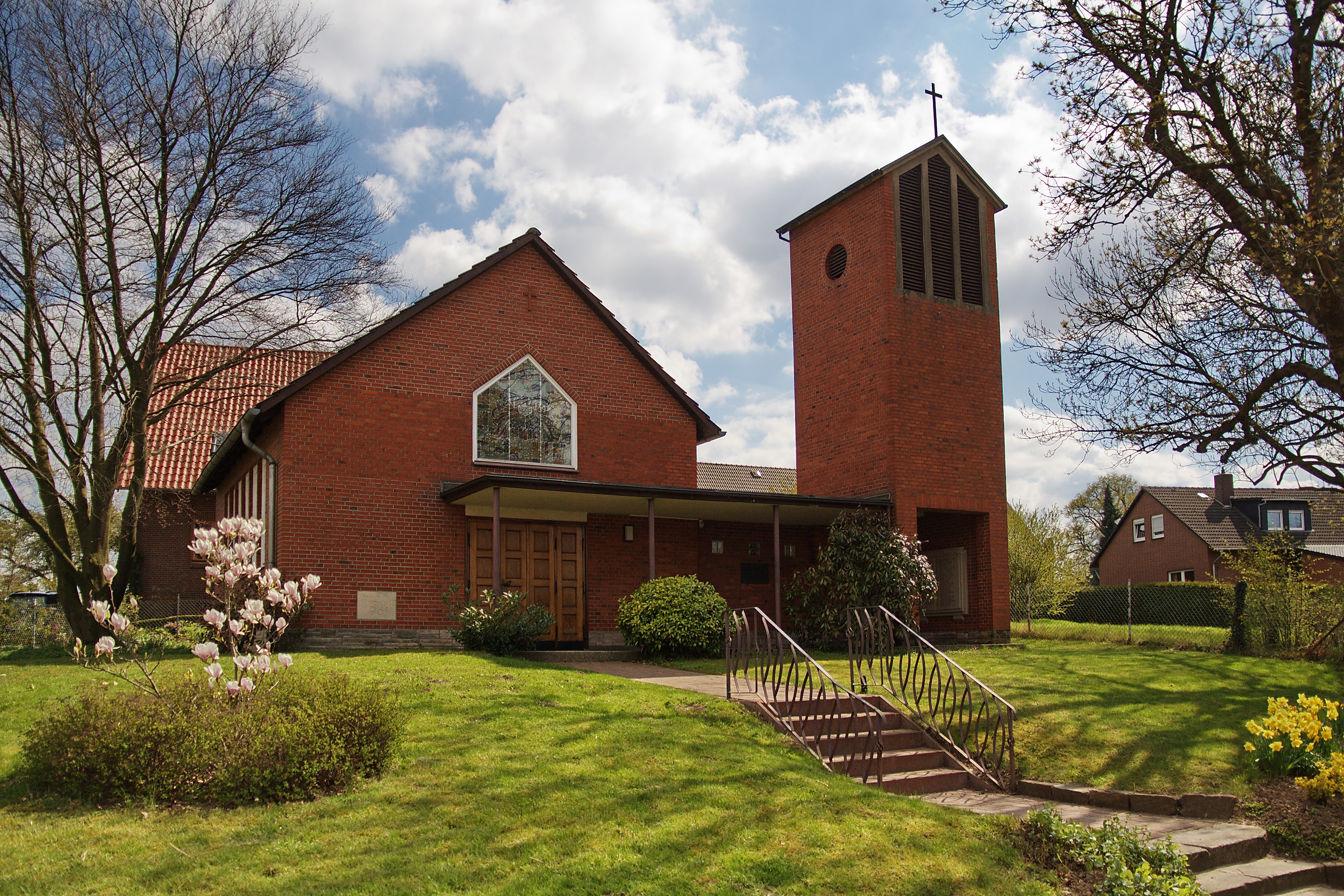 Obentraut-Kapelle in Döteberg (Seelze), Niedersachsen, Deutschland